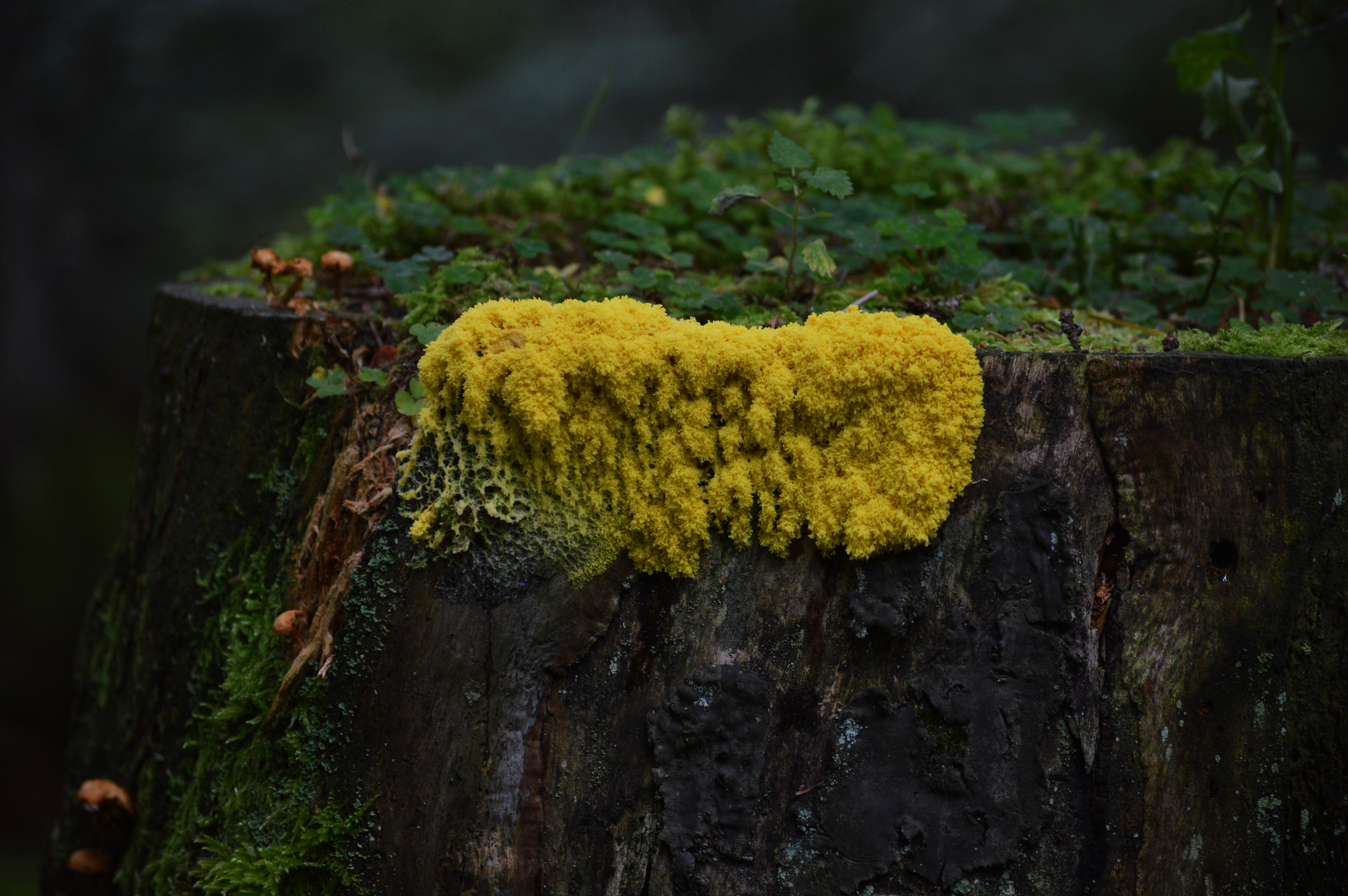 Diese Aufnahme wurde im Schwarzwald am Hochmoor Kaltenbronn gemacht.